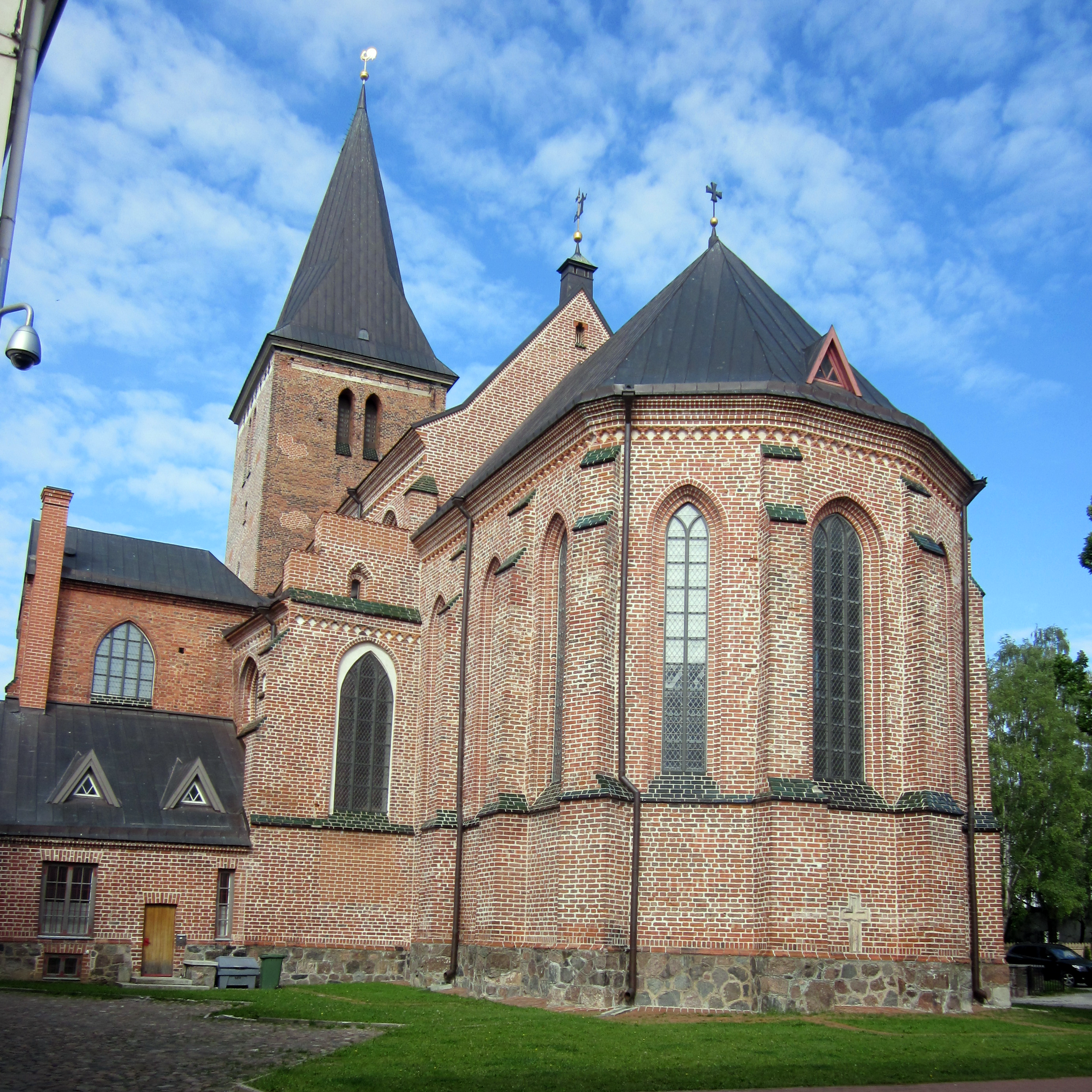 Tartu Jaani kirik idast